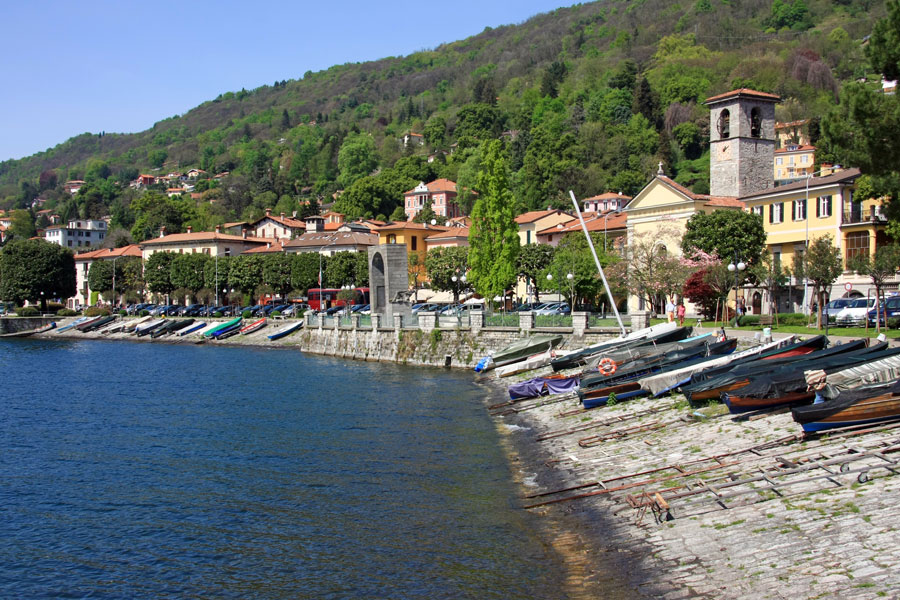 Veduta del lungolago di Suna, frazione di Verbania